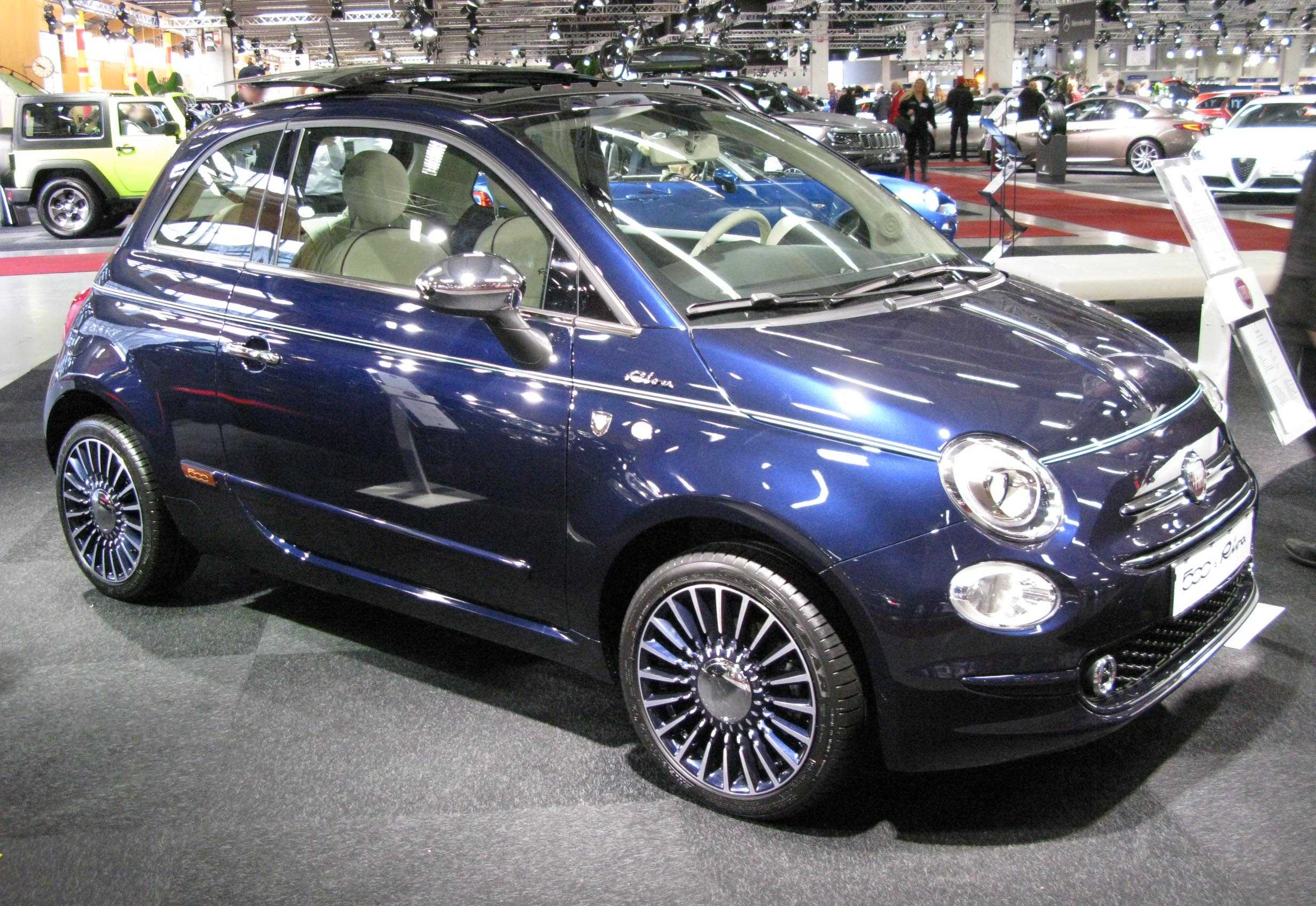 2017 Fiat 500 Riva